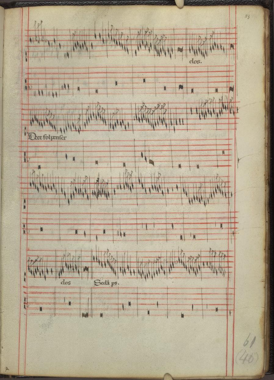 Codex Faenza